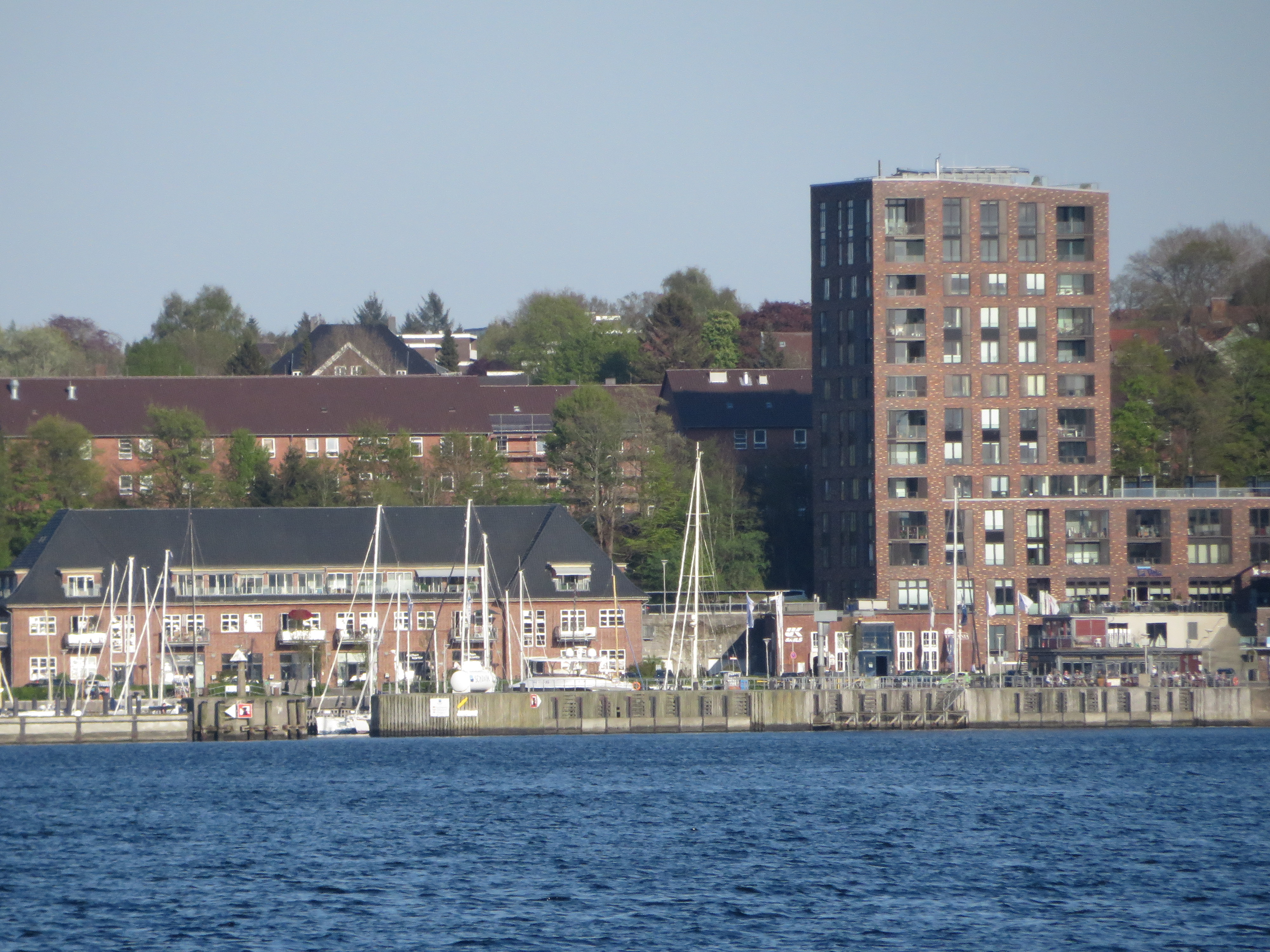 Sonwik mit Turmgebäude Lee (Flensburg-Mürwik 2014)